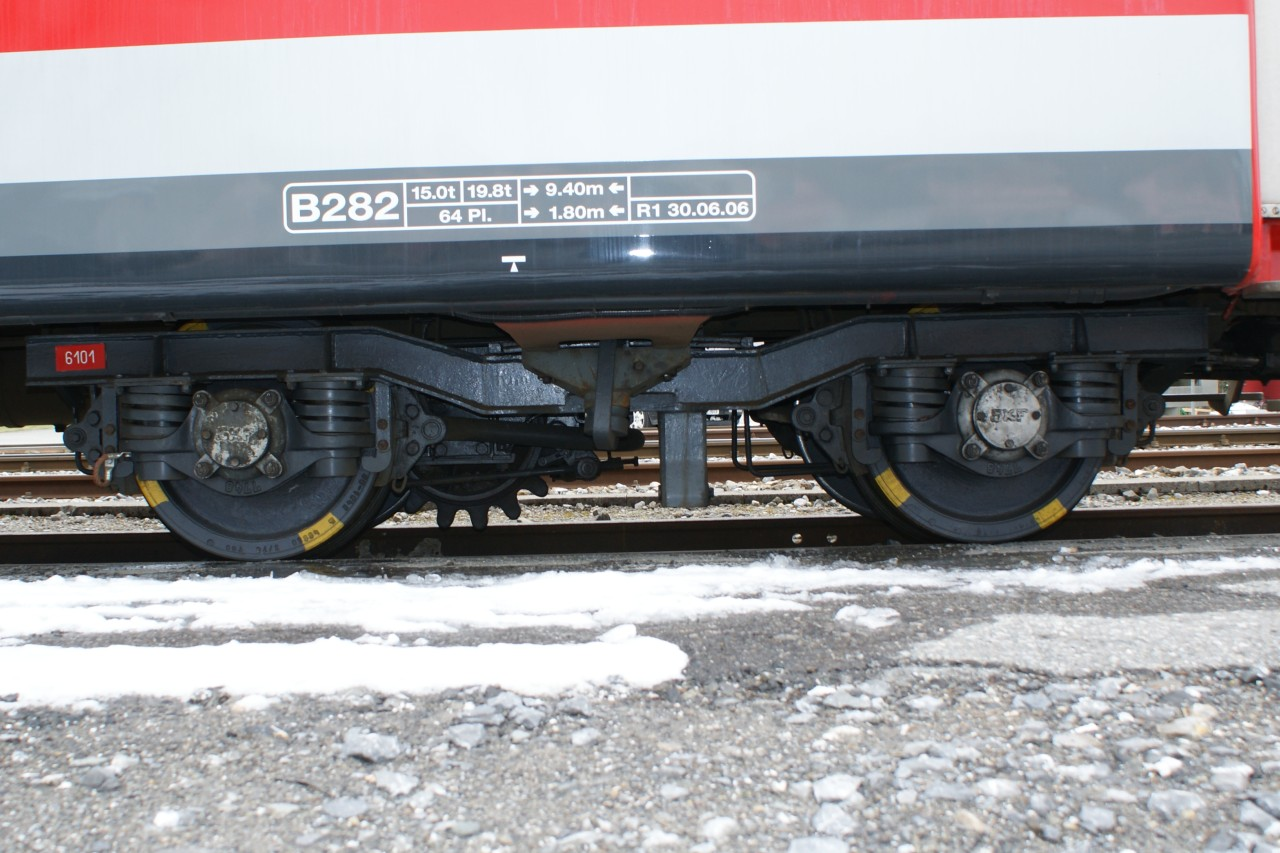 SIG-Schelling-Torsionsstabdrehgestell unter dem B 282 (1948) der AB